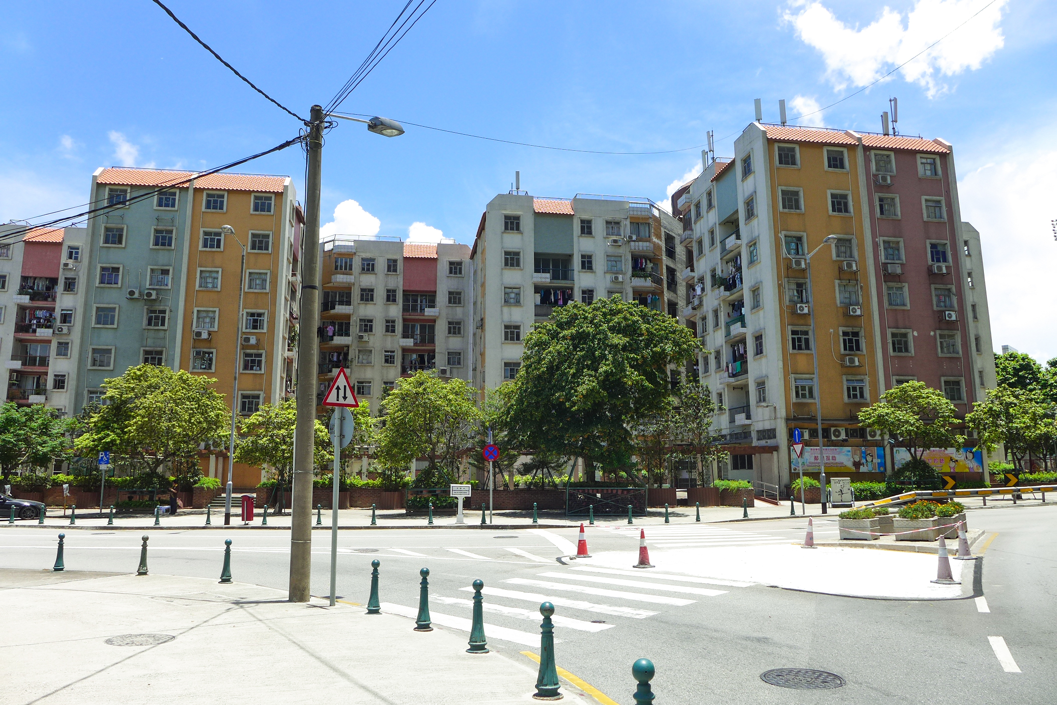 氹仔平民新村